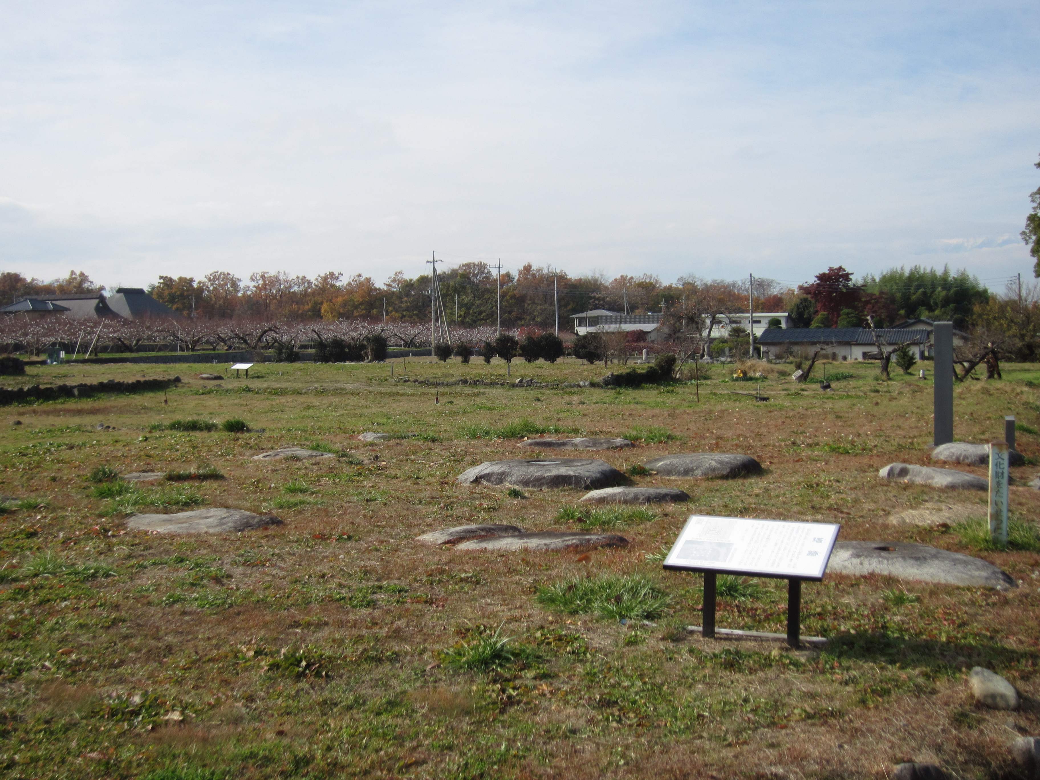 甲斐国分寺跡 塔跡 Kai Kokubunji pagoda site, Fuefuki, Yamanashi, Japan